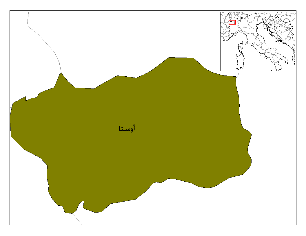 مقاطعة إقليم فالي دا أوستا الإيطالي بالعربية